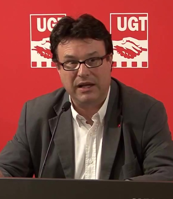 Reunió de Josep M. Àlvarez amb Joan Josep Nuet